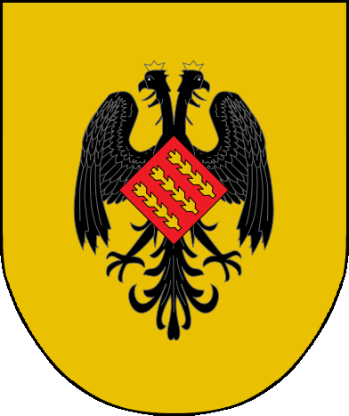 Escut dels Comtes de Pallars (Pallars Jussà i Pallars Sobirà)